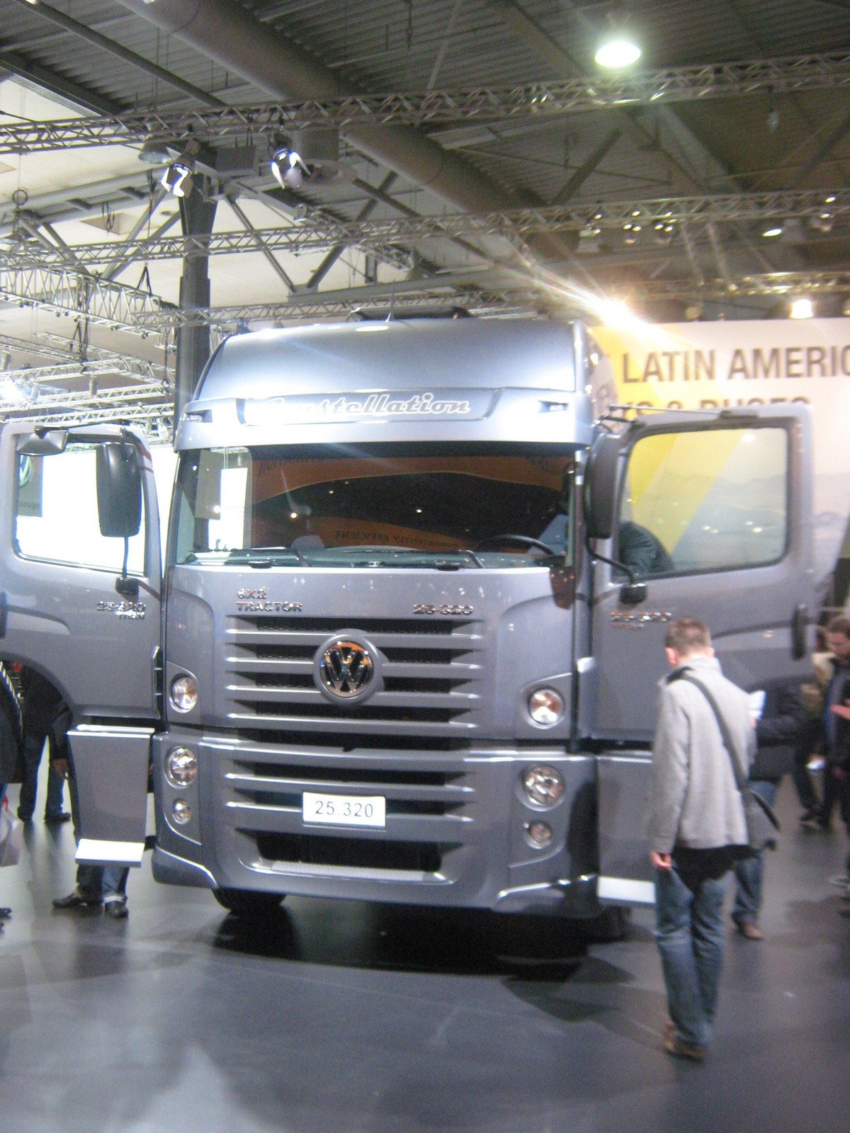 Internationale Automobilausstellung für Nutzfahrzeuge in Hannover 2010